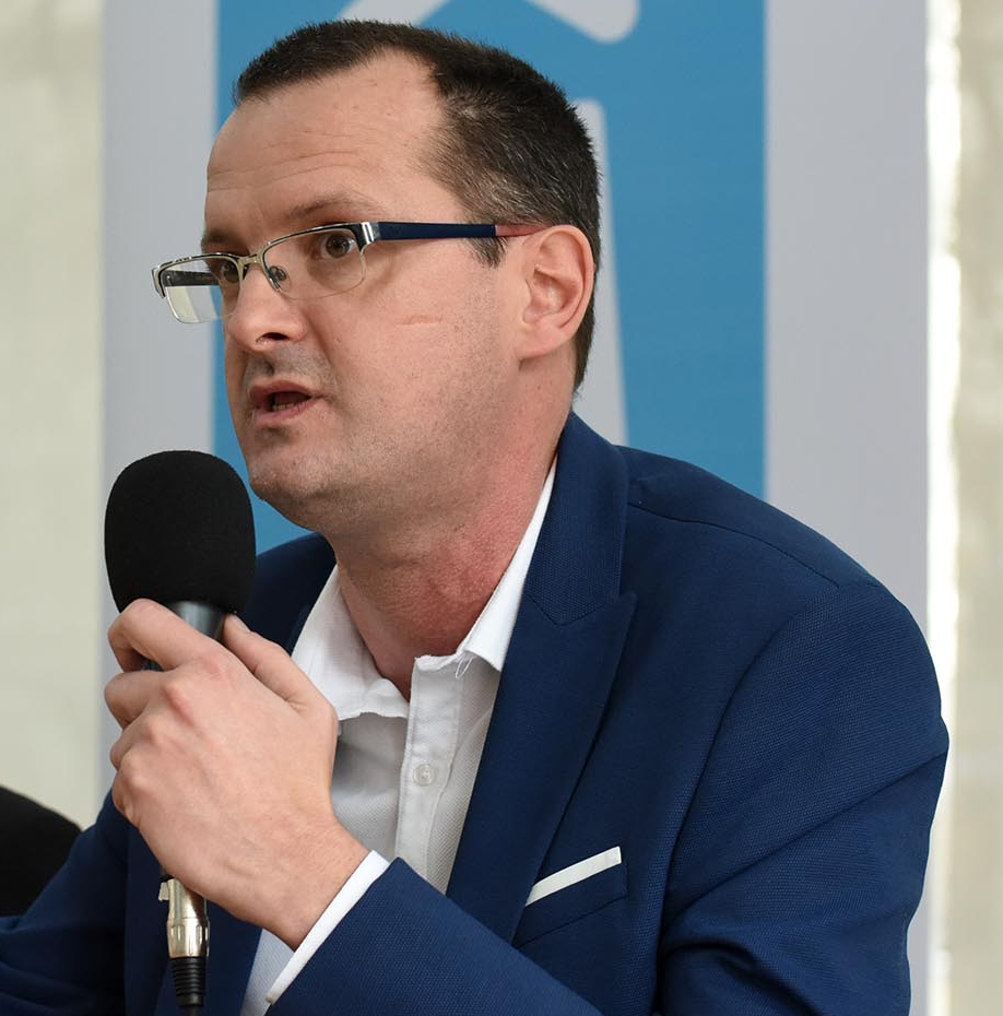 Ingeniero uruguayo, Guillermo Moncecchi